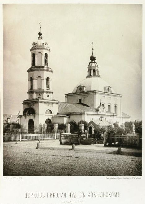 Фотография храма, снесенного в 1930-е годы